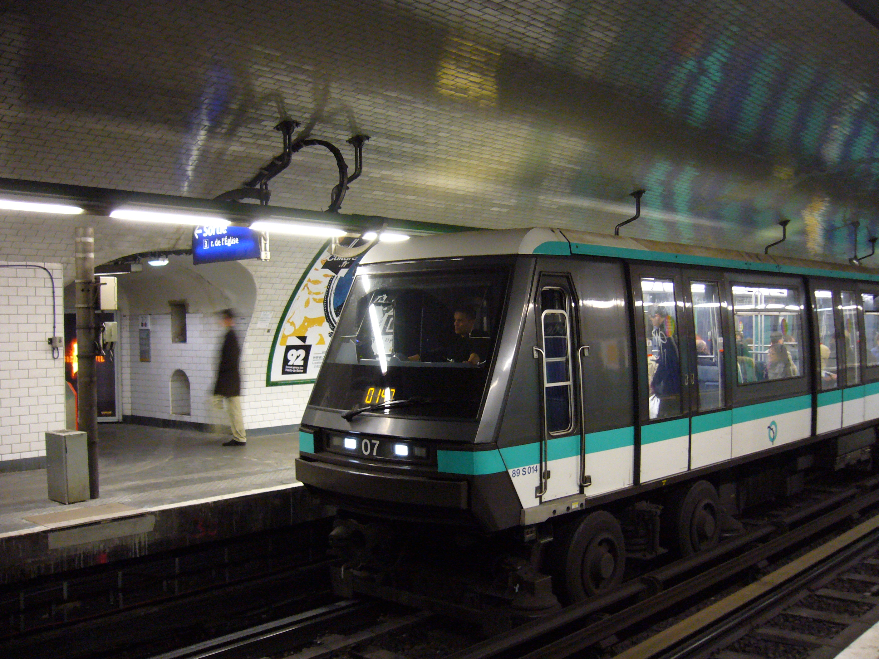 Un MP 89 à quai à la station Pont de Neuilly sur la ligne 1 du métro de Paris.